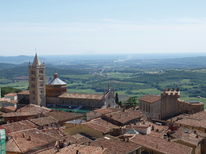 Massa Marittima, Toscana, Italia Description in de wikipedia Beschreibung: Altstadt Massa Marittima, Blick von der Burg auf die Stadt, im Hintergrund die Bucht von Follonica Datum: Juni 2004 Fotograf: Peter Schüle Lizenz: GFDL